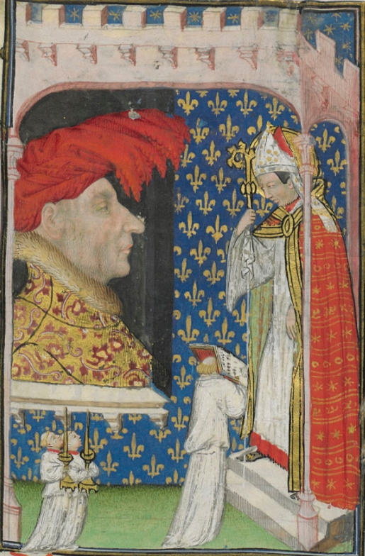 Maître de Rohan. Saint René et portrait de Louis II d'Anjou miniatures dans le manuscrit réalisé par le maître de Rohan à Angers pour René d'Anjou.